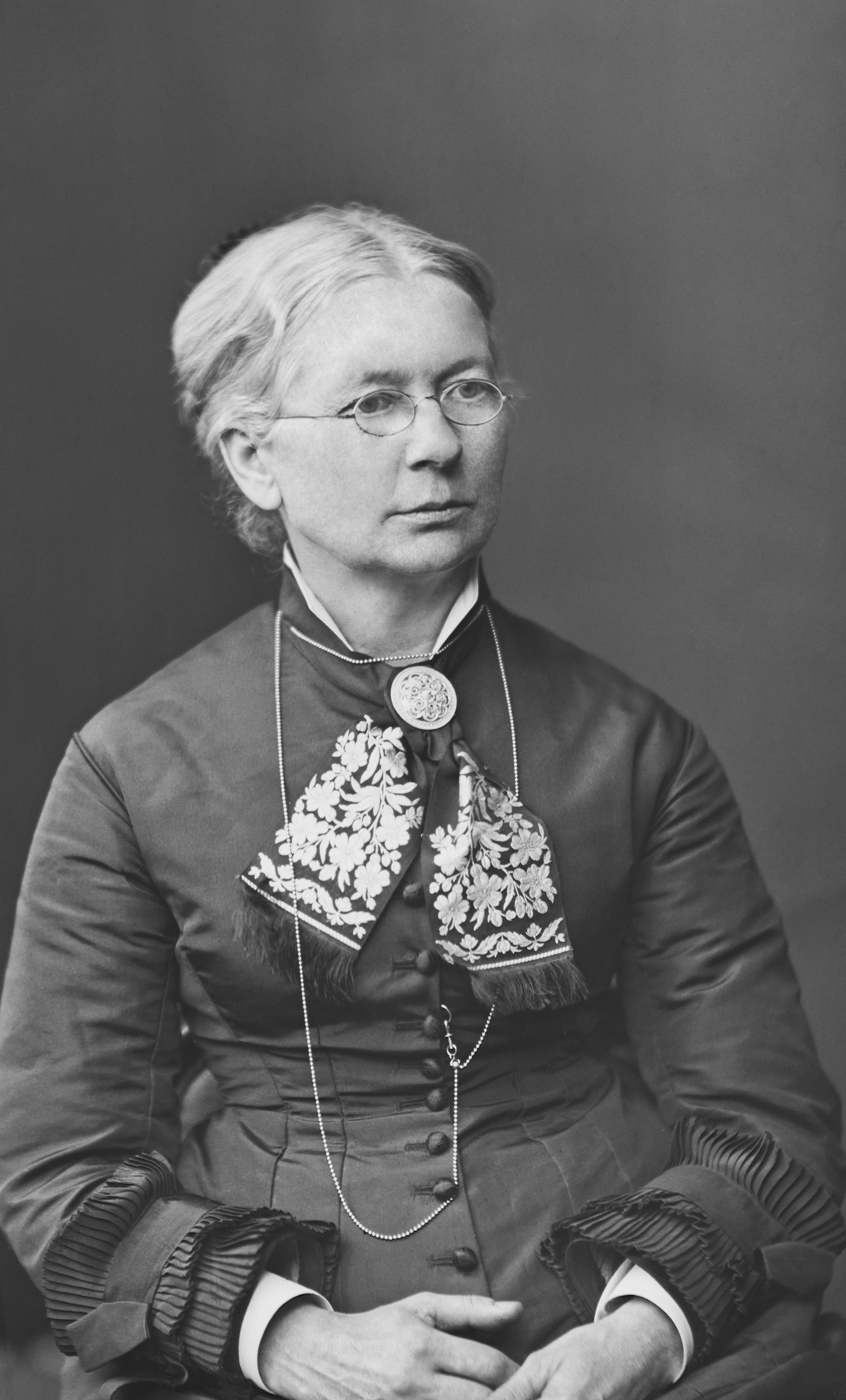 taidemaalari ja piirustuksenopettaja Augusta Soldan; pysty, mustavalkoinen, retusointi, retusointi korjattu digitoinnin yhteydessä